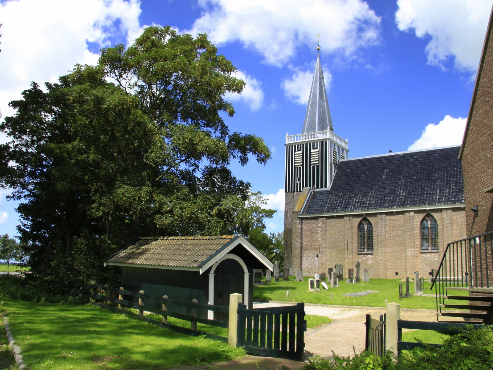 Terpdorp Abbegga in de Gemeente Zûd West Fryslân